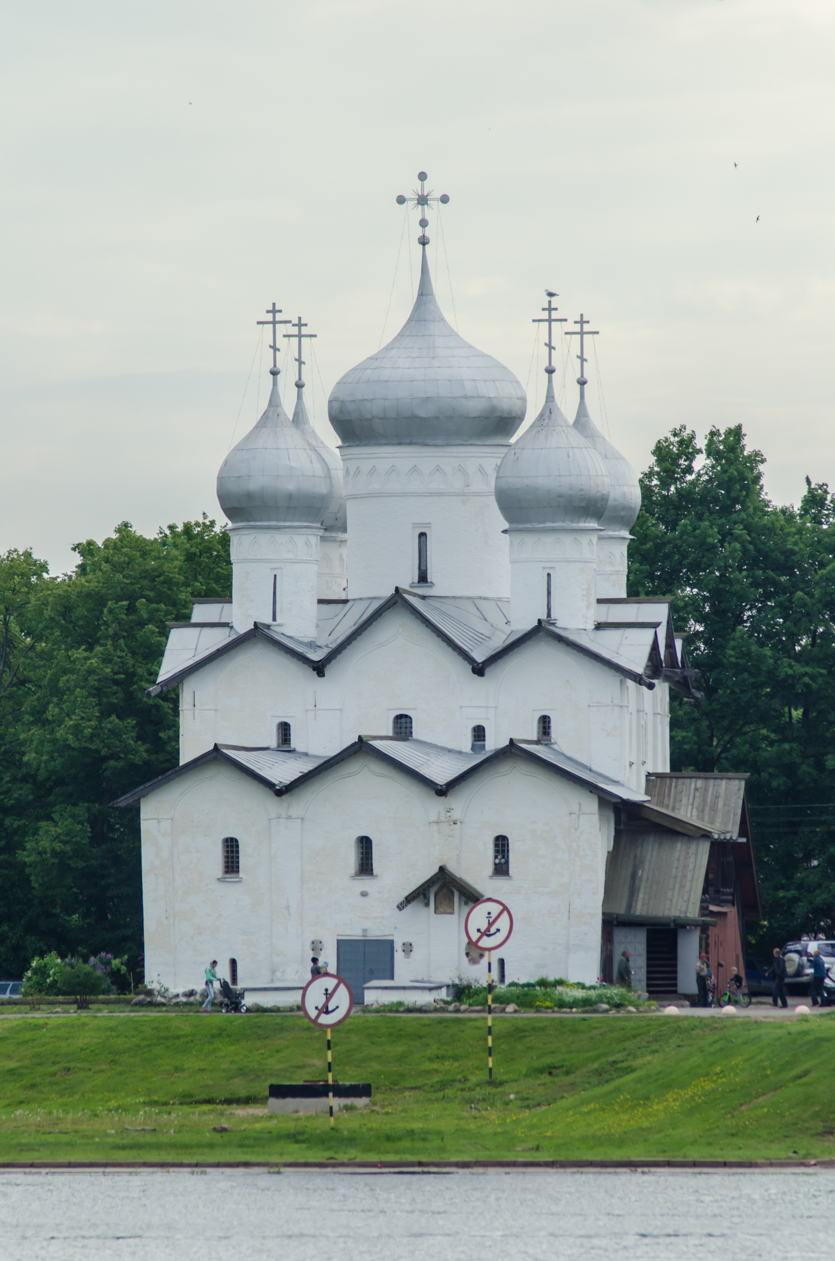 Церковь Бориса и Глеба в Плотниках (на Торговой стороне): набережная Александра Невского, Великий Новгород, Новгородская область